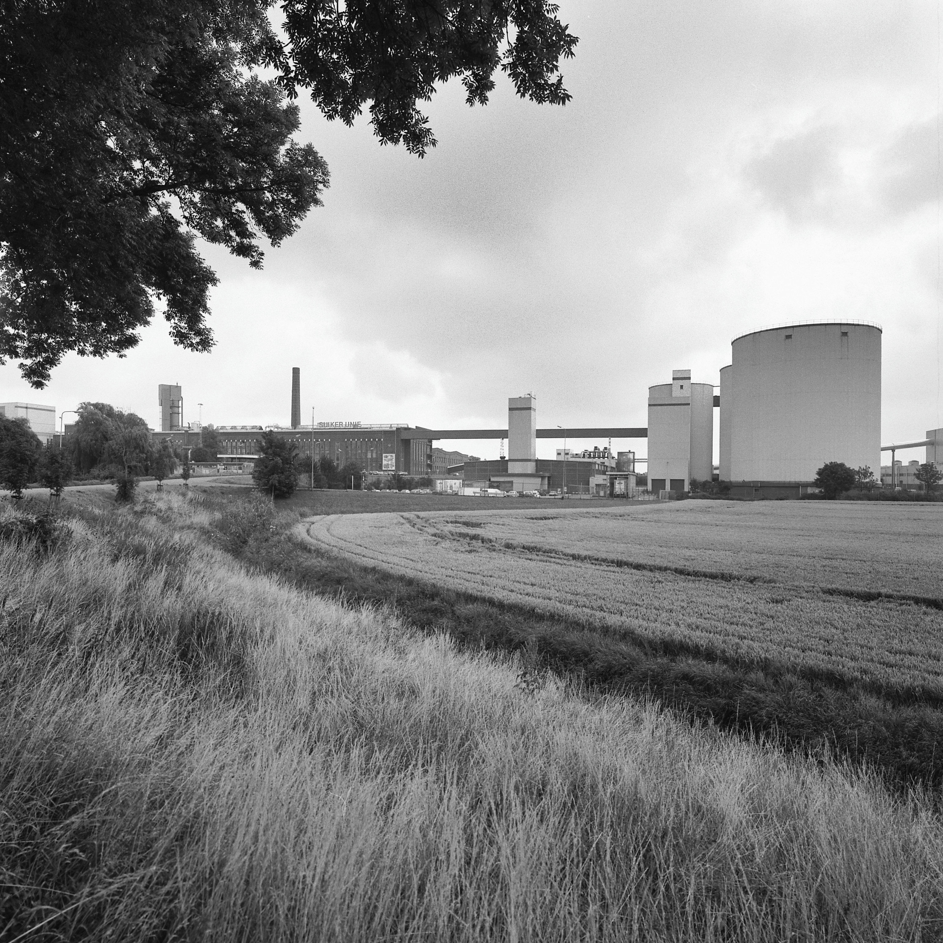 Coöperatieve Suikerfabriek en Raffinaderij: Overzicht fabriekscomplex met fabriekshallen, schoorsteen silo's en loopbrug (opmerking: Gefotografeerd voor MIP Zuid-Holland)